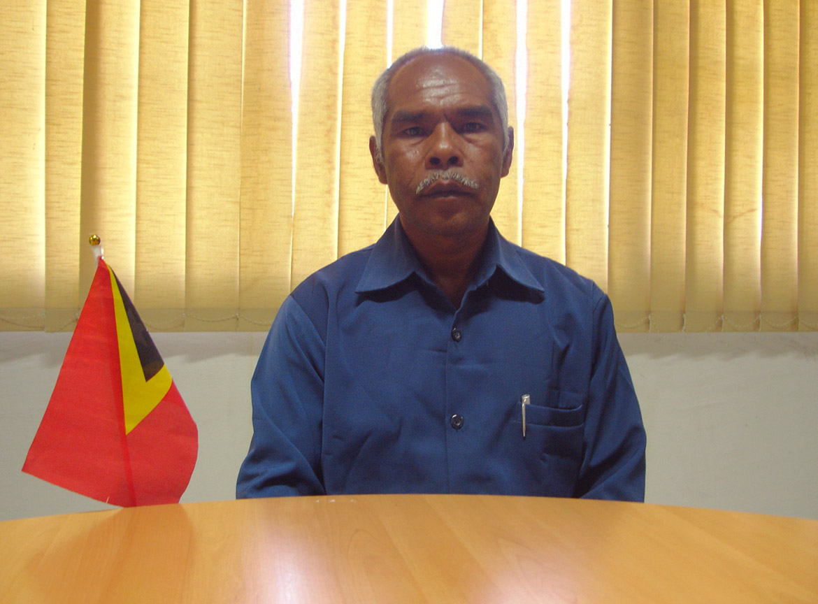 Abilio Alves, Administrator des Subdistrikts Laulara